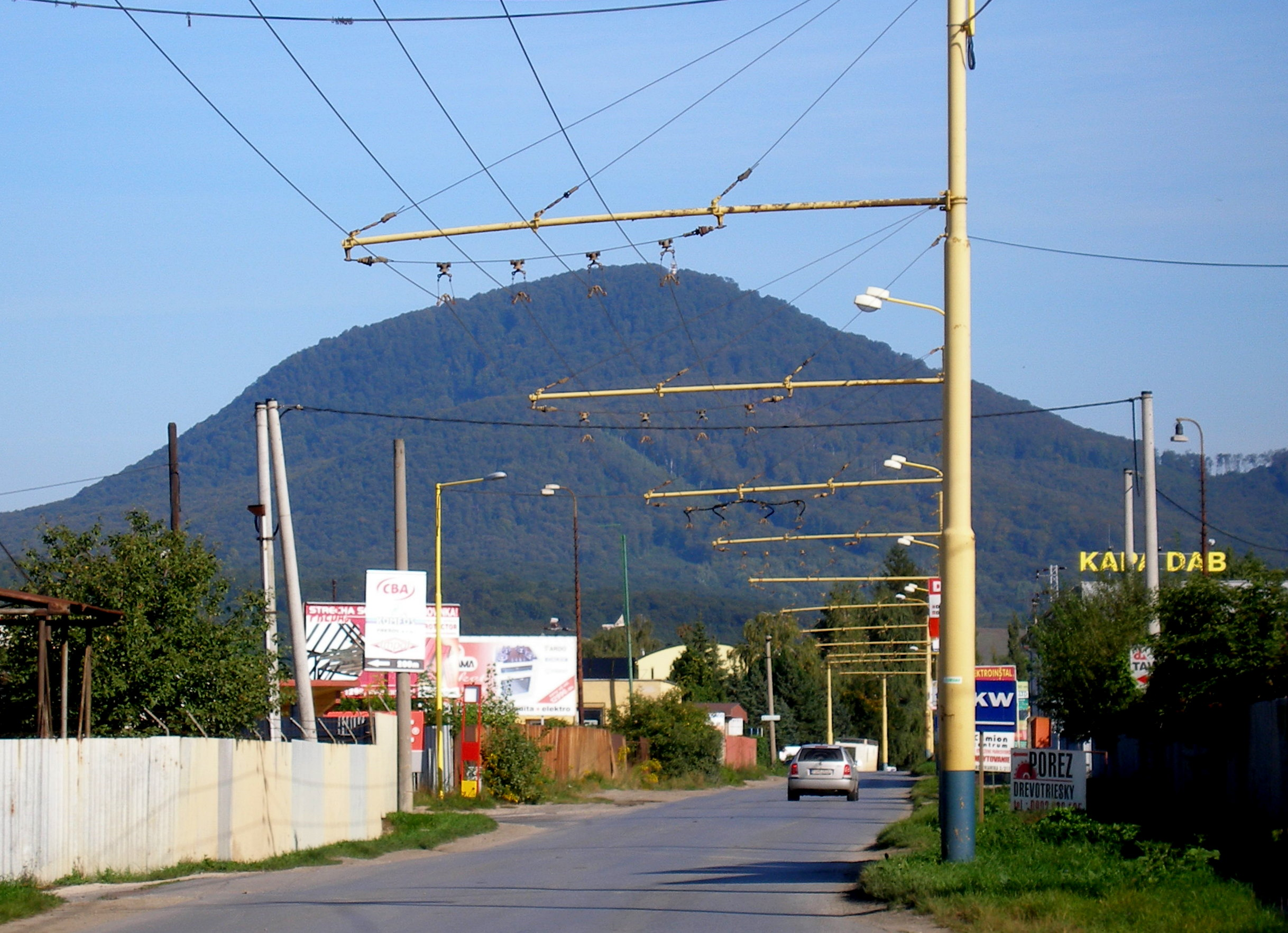 Ulica Strojnícka Prešov